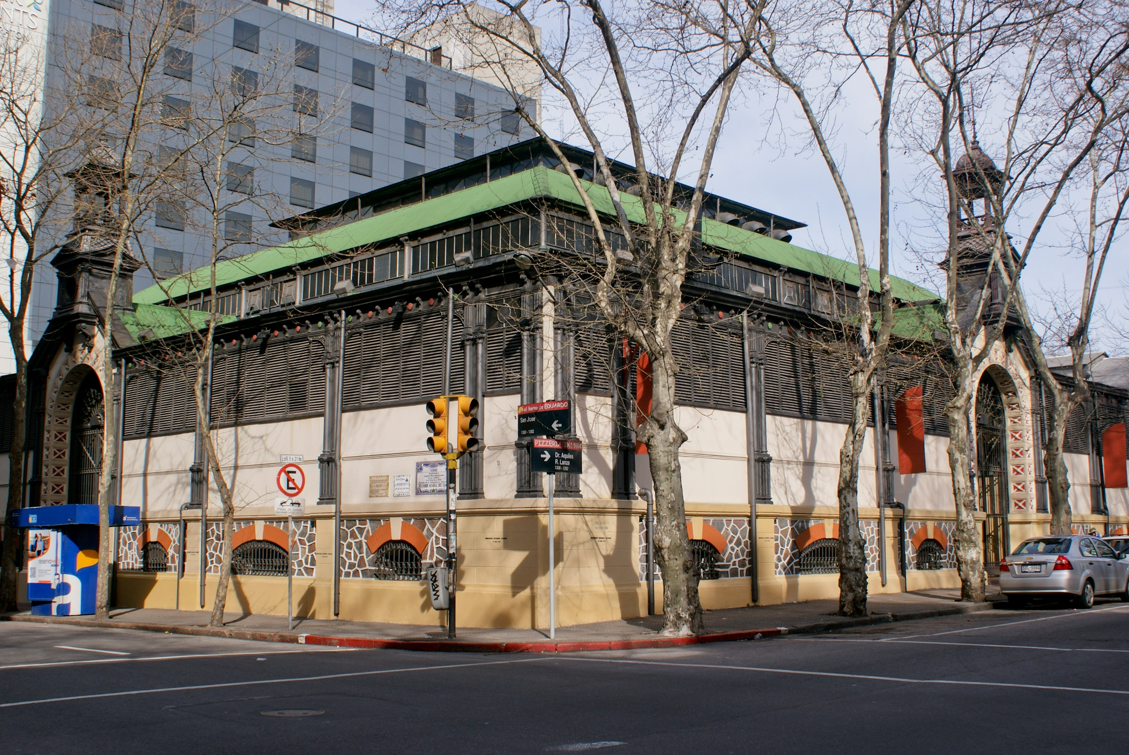 Mercado de la Abundancia. Ubicada en el departamento de Montevideo